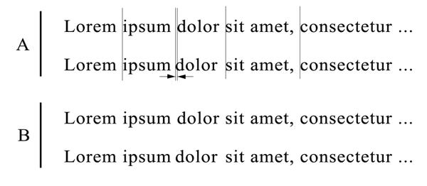 En la imagen se aprecia en la parte A que el espaciado entre palabras ha sido modificado. En la parte B se ve que a simple vista dicha separación pasa desapercibida.